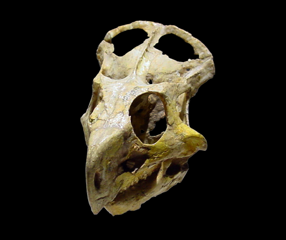 self made.